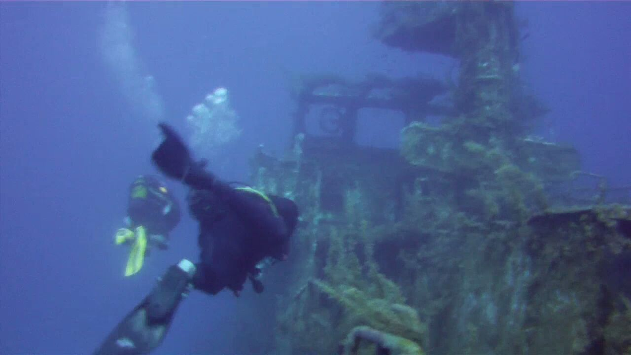 Malte l'épave du P29